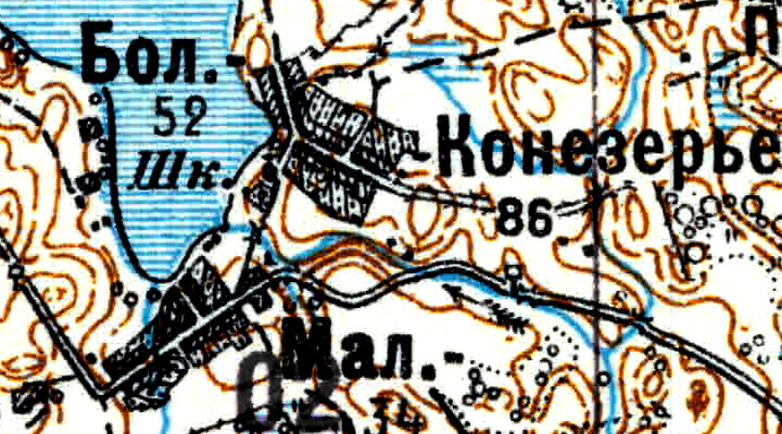 Топографическая карта Ленинградской области, квадрат Vc-29 (Батецкая), деревня Конезерье